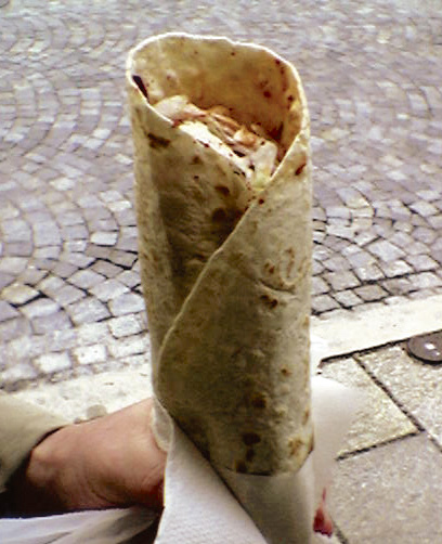 Klassischer Dürüm-Döner mit Bohnenfüllung.